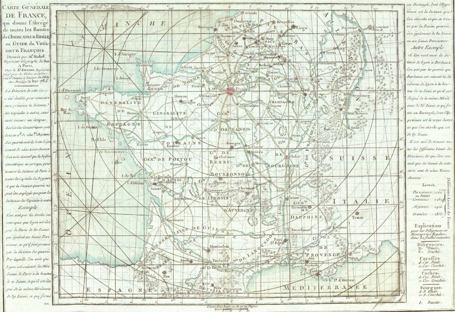 Claude-Sidoine Michel, L'Indicateur fidèle ou guide des voyageurs, 1785 ː carte générale de France.